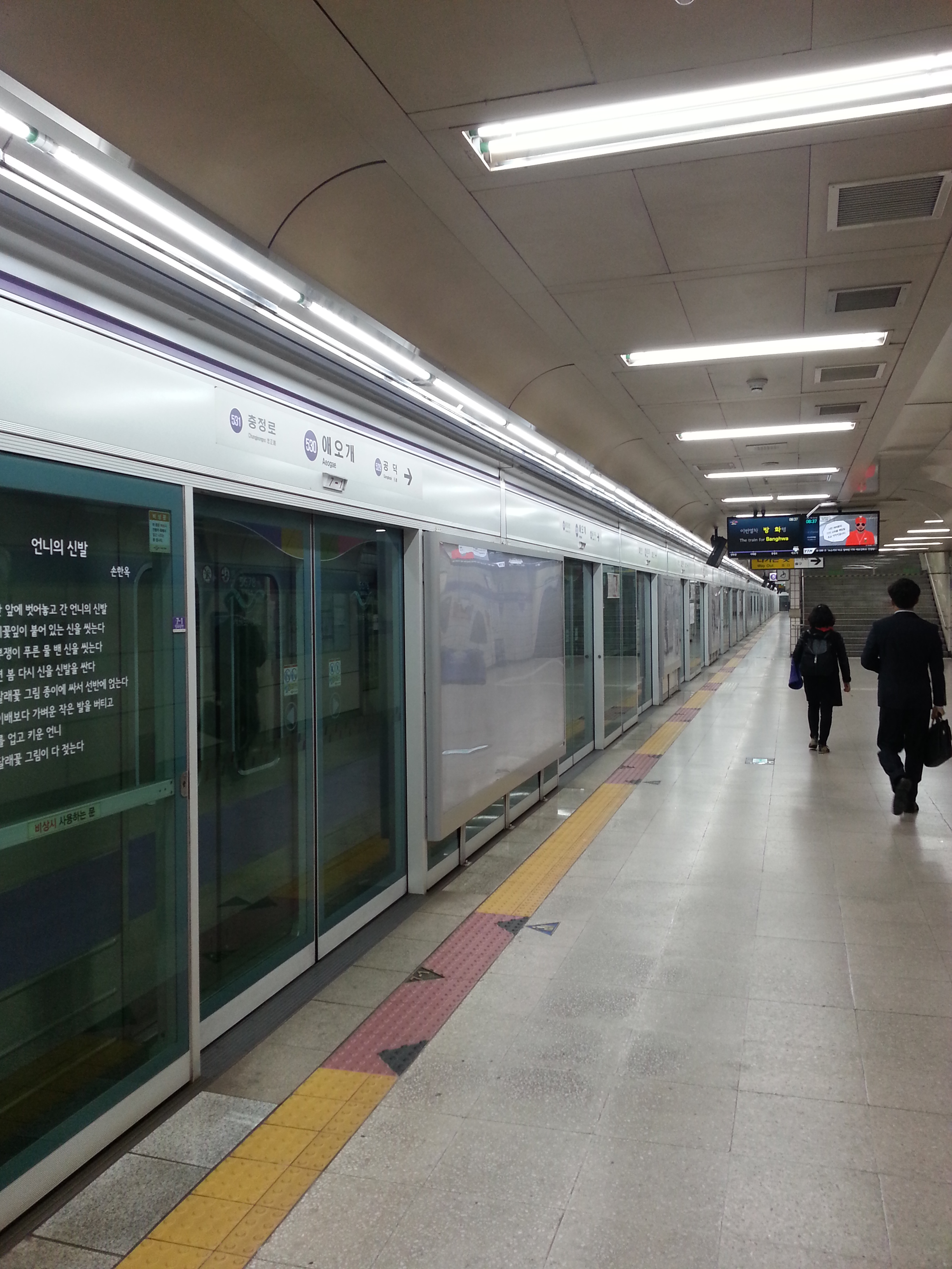 エオゲ駅ホームドア(2014年3月現在)